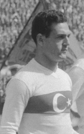 İsmail Kurt